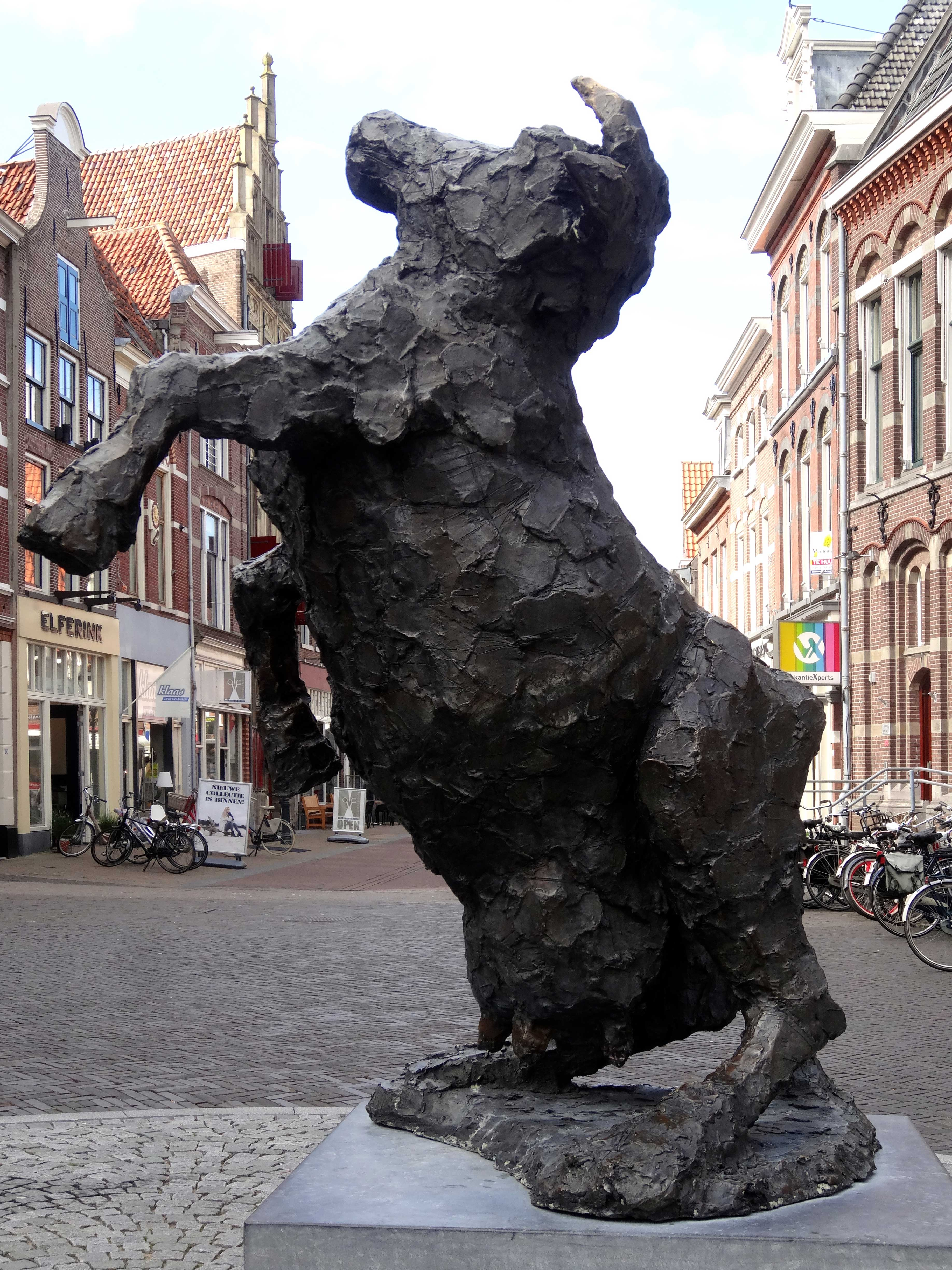 De Kamper koe door Jits Bakker in Kampen